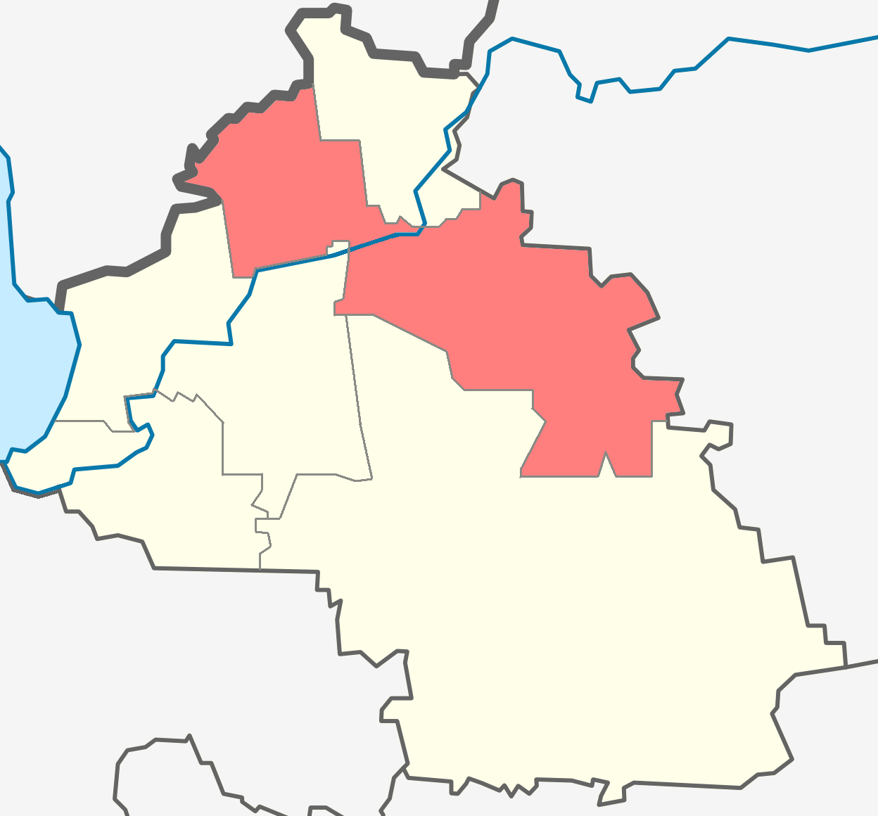 Янегское СП на карте Лодейнопольского района